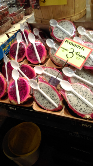 Draakonivili turul